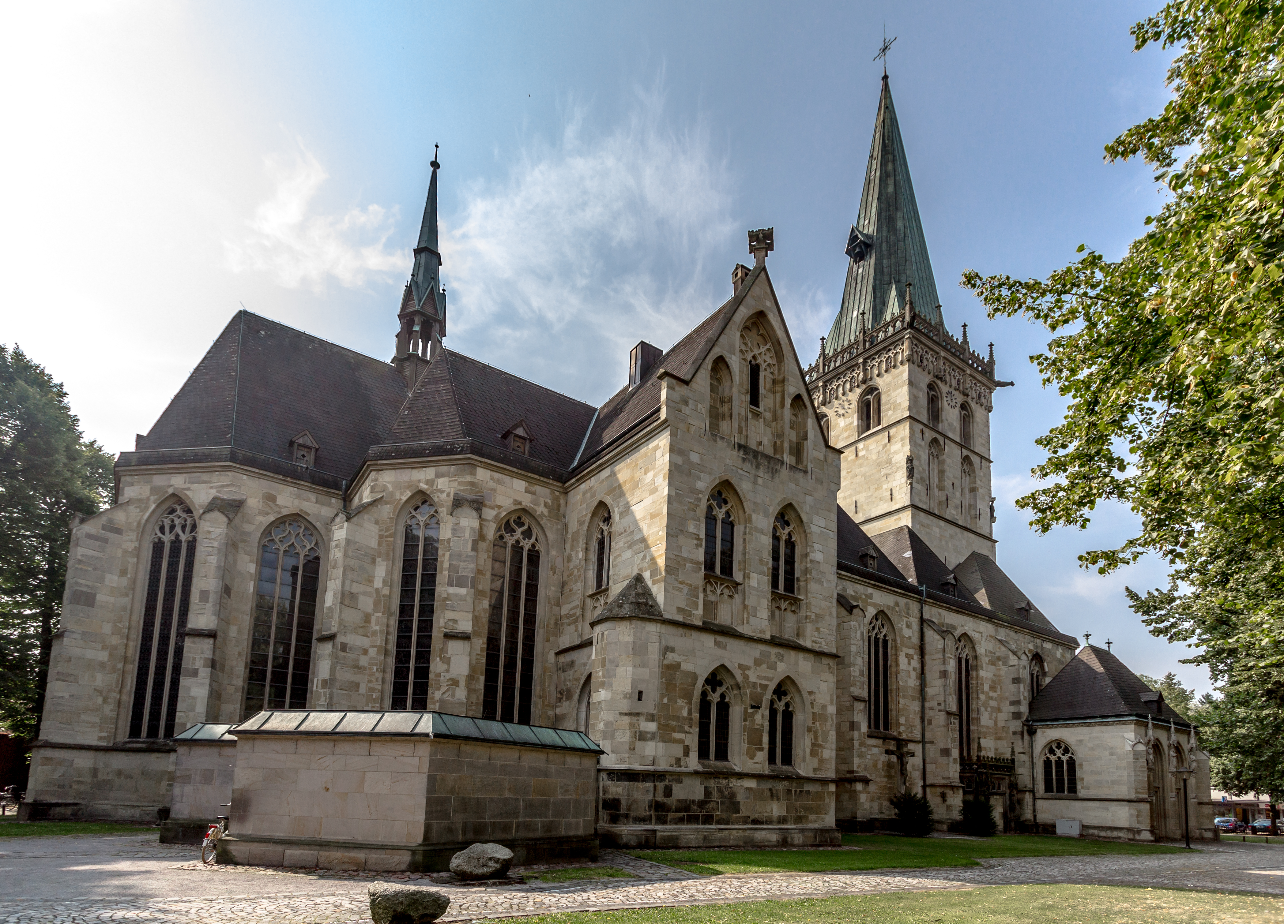 St.-Felizitas-Kirche in Lüdinghausen This image shows a heritage building in Germany, located in the North Rhine-Westphalian city Lüdinghausen (no. A/002).